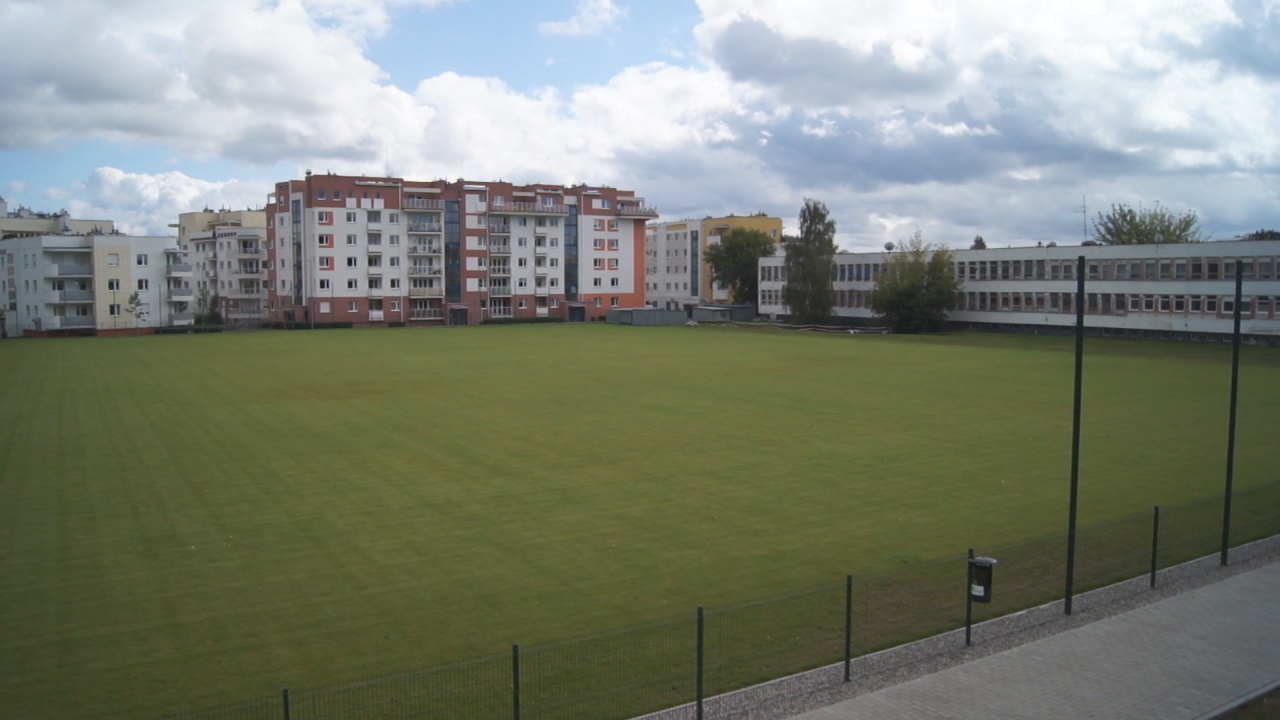 Chemik Bydgoszcz - miejsce na nowe boisko